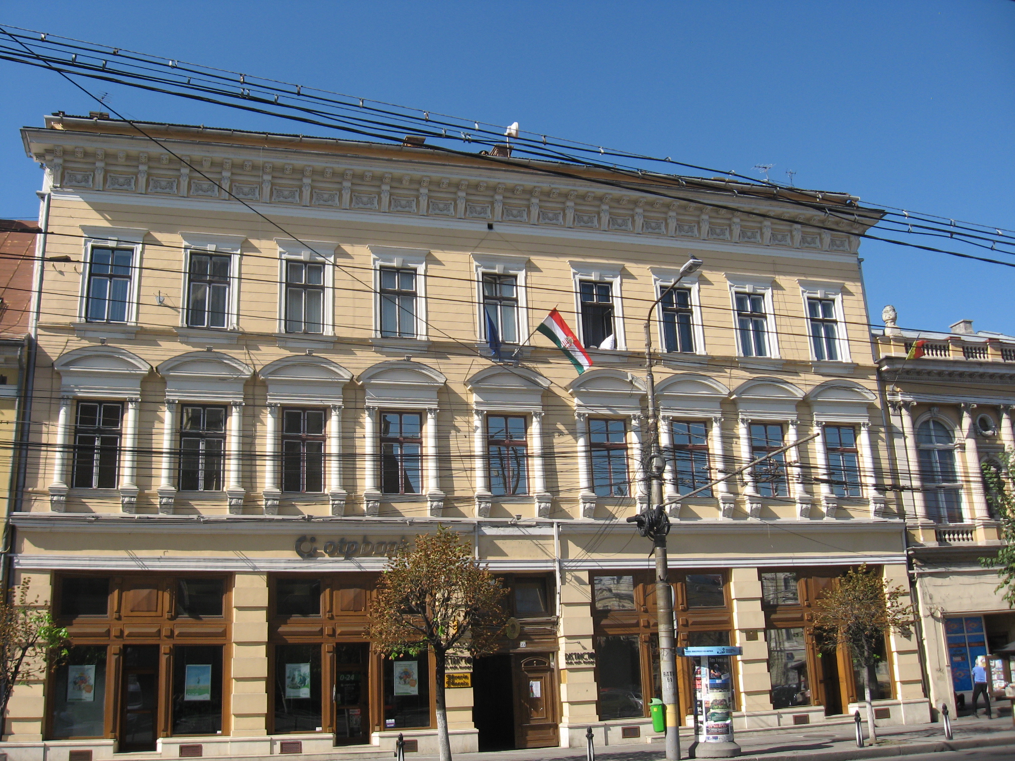 Cluj-Napoca, Consulatul General al Ungariei (Piaţa Unirii nr.23)